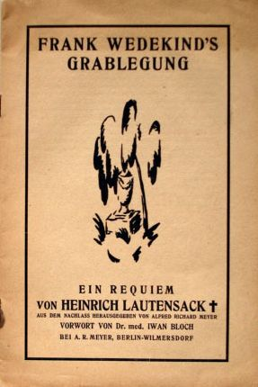 Frank Wedekind's Grablegung. Ein Requiem von Heinrich Lautensack aus dem Nachlass herausgegeben von Alfred Richard Meyer, Berlin. Mit einem Vorwort von Iwan Bloch. (Verlag von) A. R. Meyer, 1919 15 S., Original Broschur. Klammerung korrodiert, Seiten gegilbt, gute Erhaltung der empfindlichen Broschur, Gr.8°